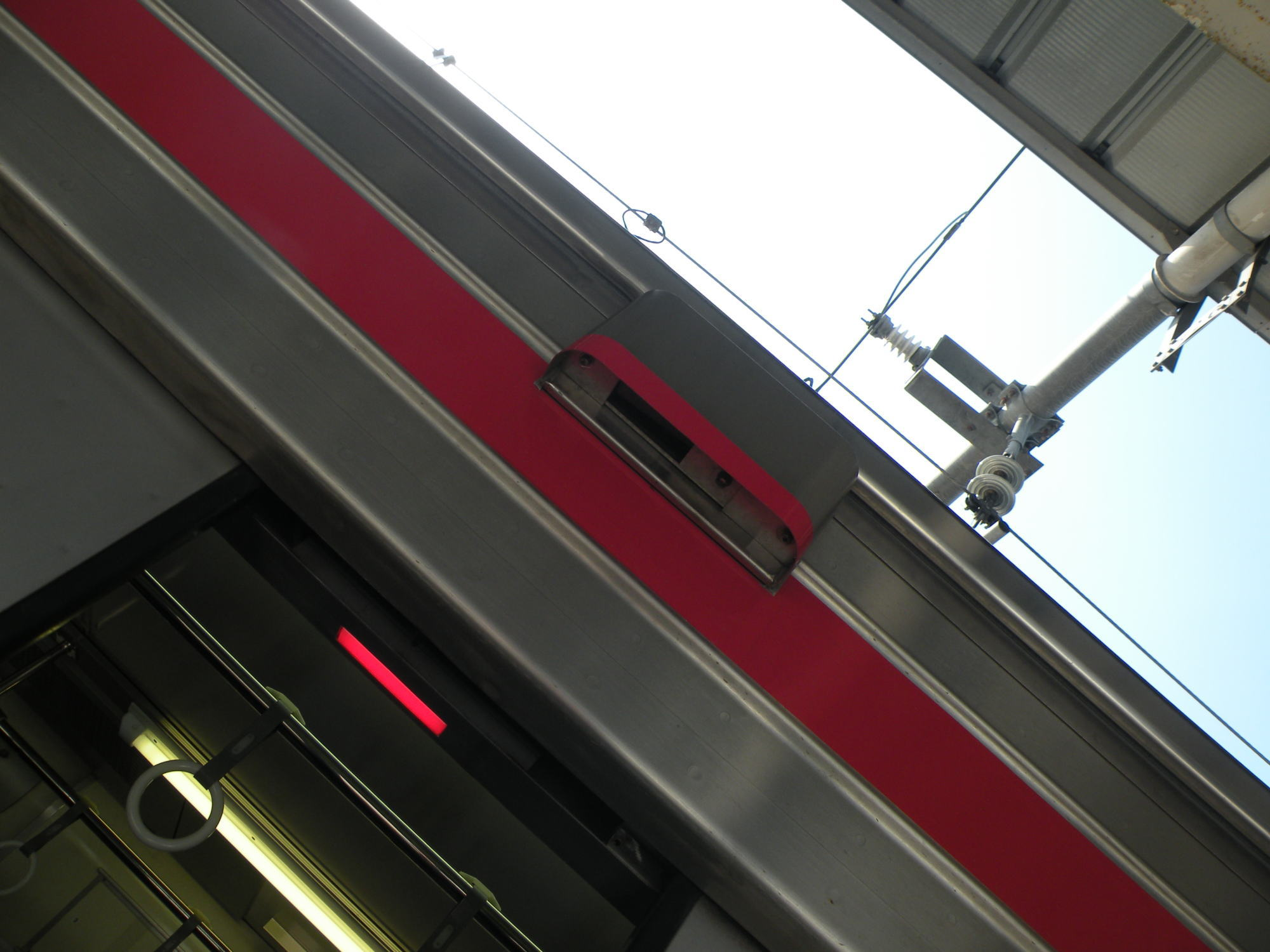 121系更新車ドア周辺、開閉予告灯とドアセンサー ( 2012.04.07 - JR高松駅 )